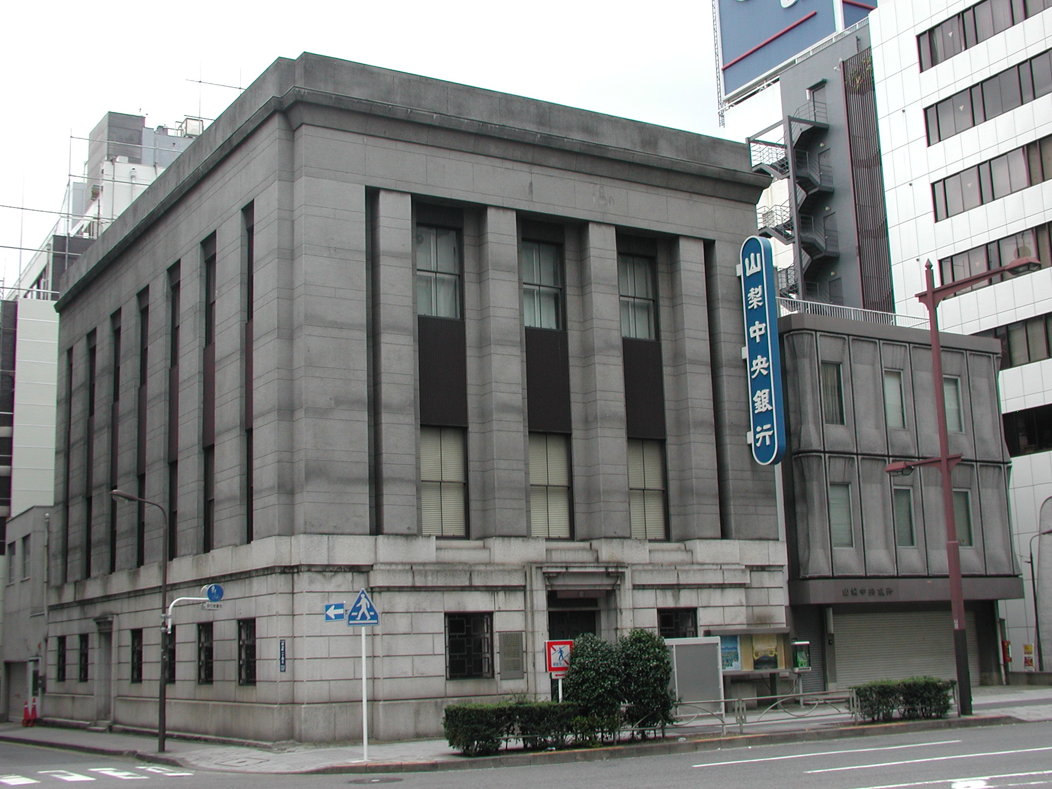 山梨中央銀行 東京支店：店番・201 ※：千代田区景観まちづくり重要物件に指定 34. 山梨中央銀行東京支店 (指定日：平成15年6月9日 / 所在地：鍛冶町1-6-10) (in Japanese). 千代田区景観まちづくり重要物件指定一覧表. Chiyoda ward office, Tokyo.